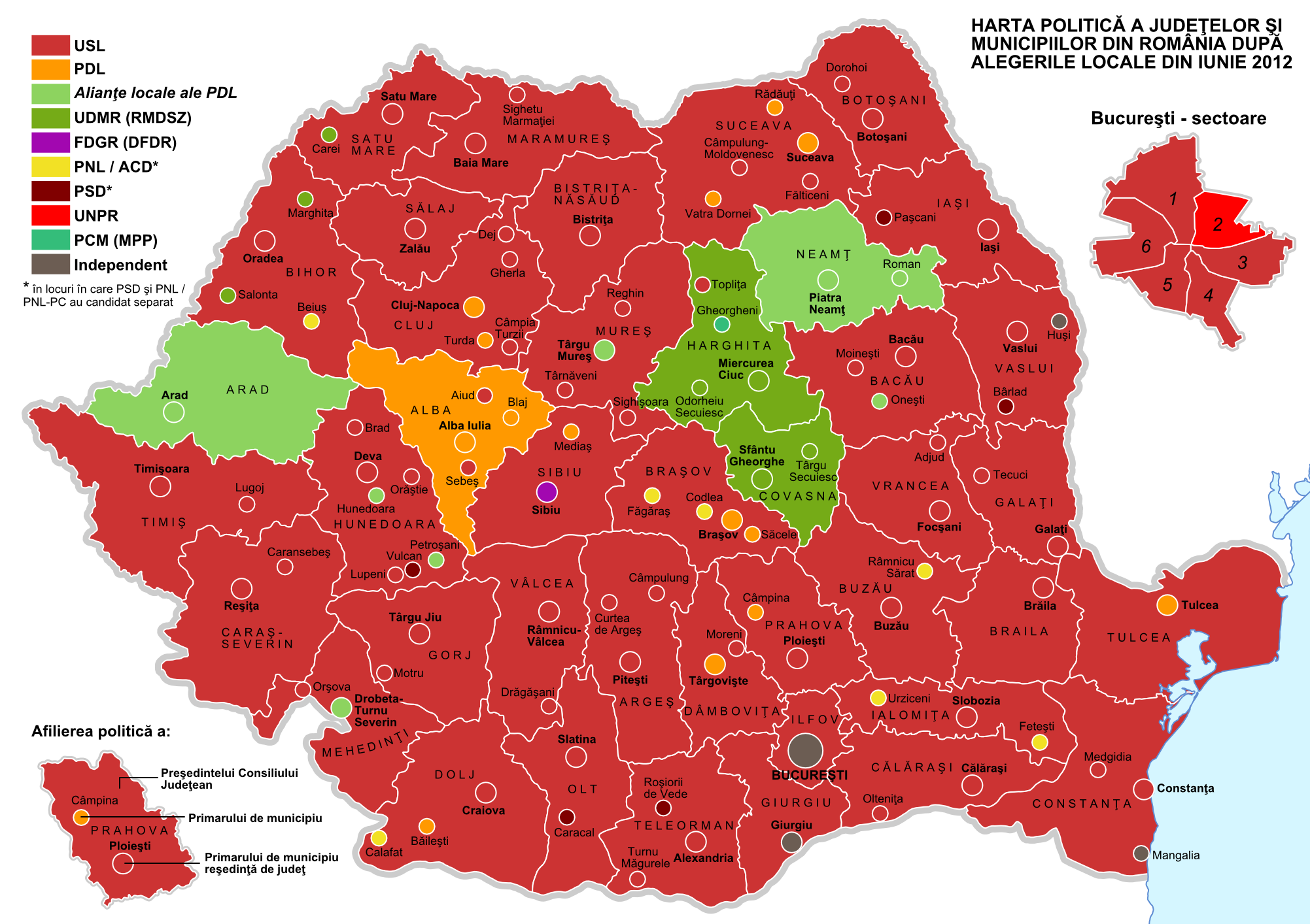 Harta alegerilor locale din iunie 2012. Sursa